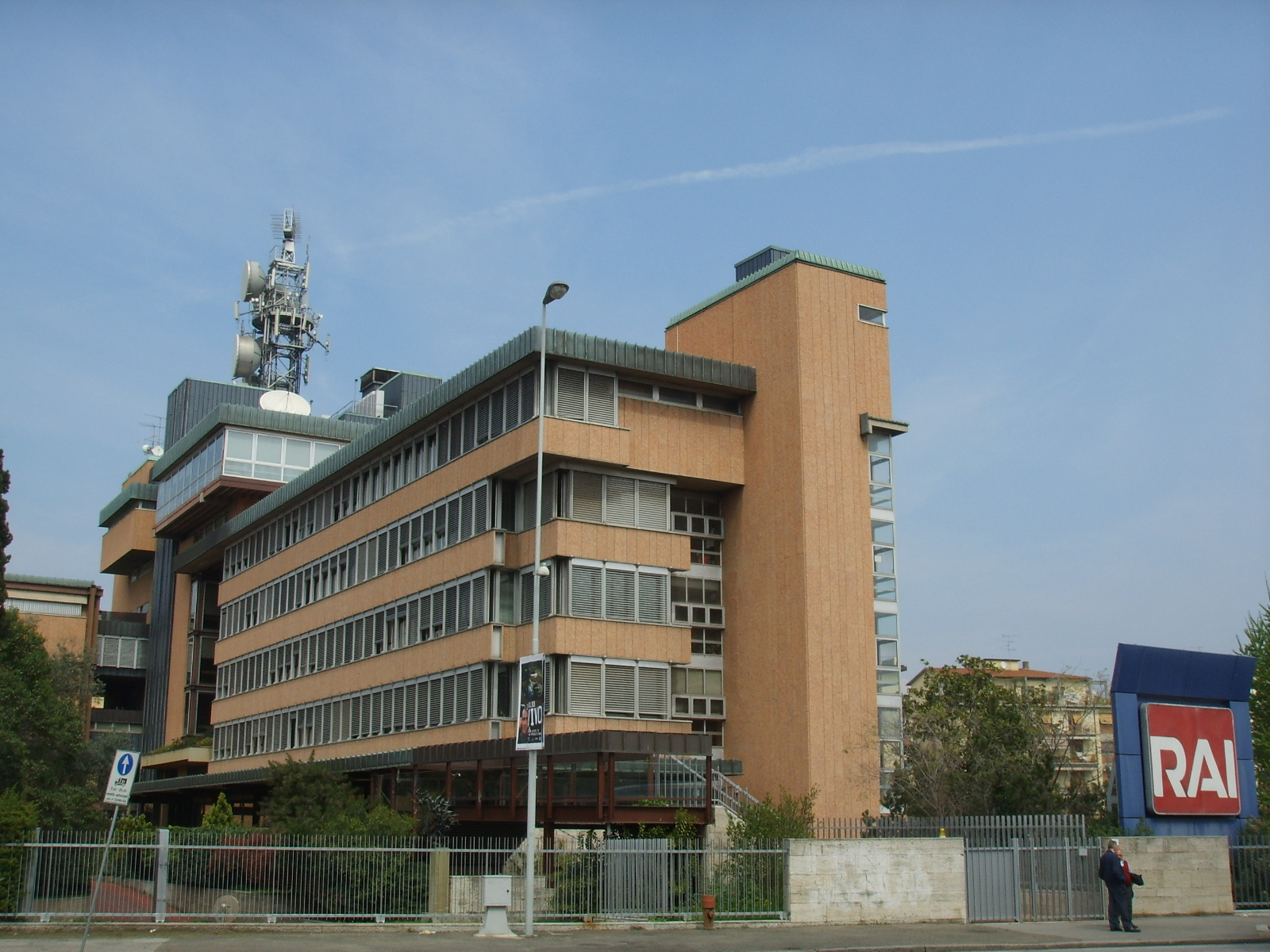 Radiotelevisione Italiana (RAI), Firenze